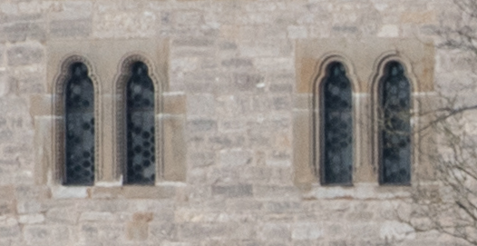 Rothenburg ob der Tauber, Alte Burg, Balsiuskapelle, Burggasse 21, Gartenhaus